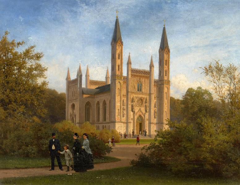 Wilhelm Riefstahl: Die Schloßkirche zu Neustrelitz mit der Familie des Neustrelitzer Bürgermeisters Hermann Buttel (1823-1891); Öl auf Leinwand. 40 x 52cm. Signiert unten links: W. Riefstahl. Van Ham Auction 335. Auktion "Alte Kunst", Los 500, 16.05.2014 purchased by City of Neustrelitz for € 10.625